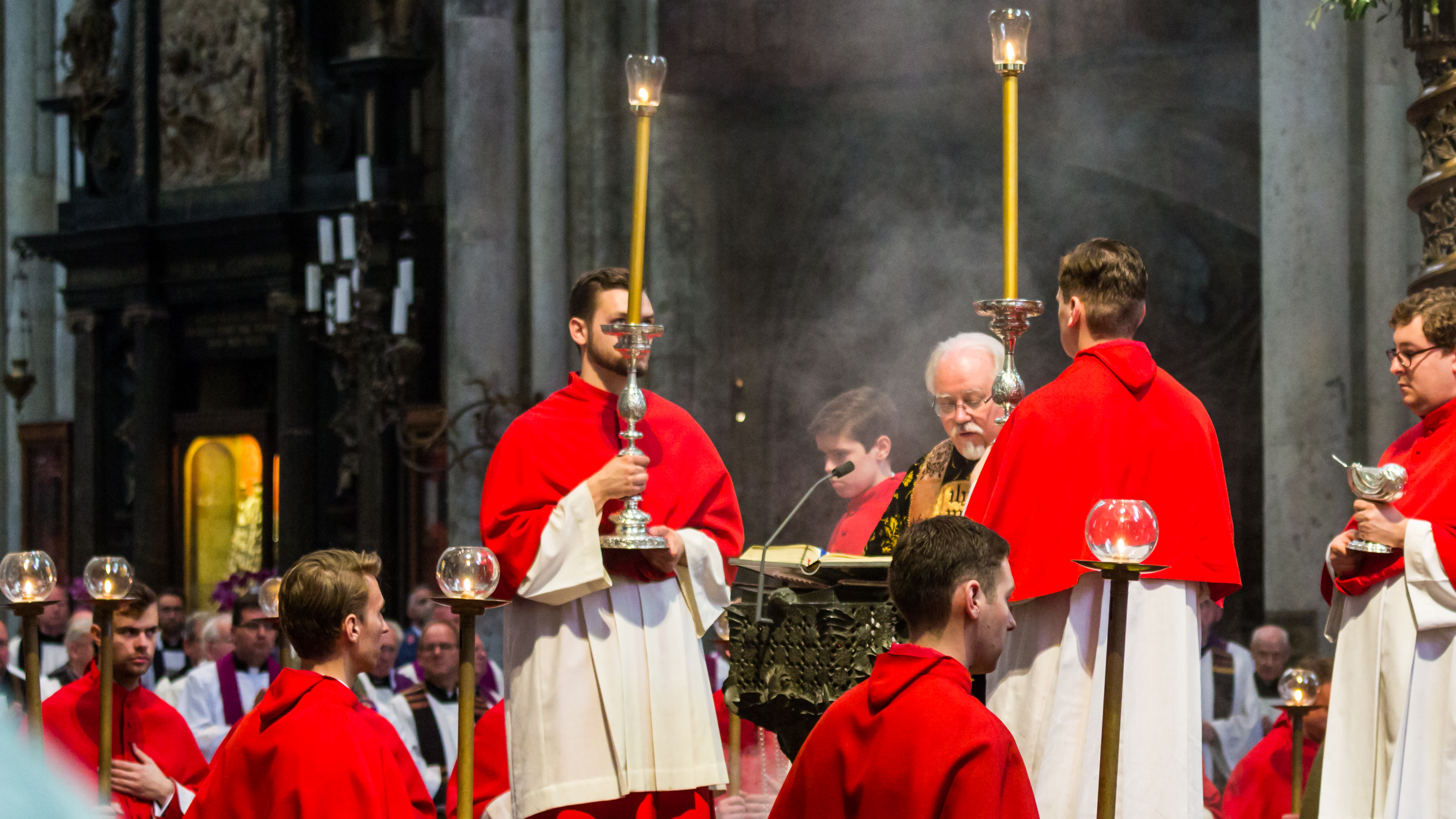 Exsequien Joachim Kardinal em. Meisner Foto: Lesung aus dem Evangelium durch Domdiakon Reimund Witte